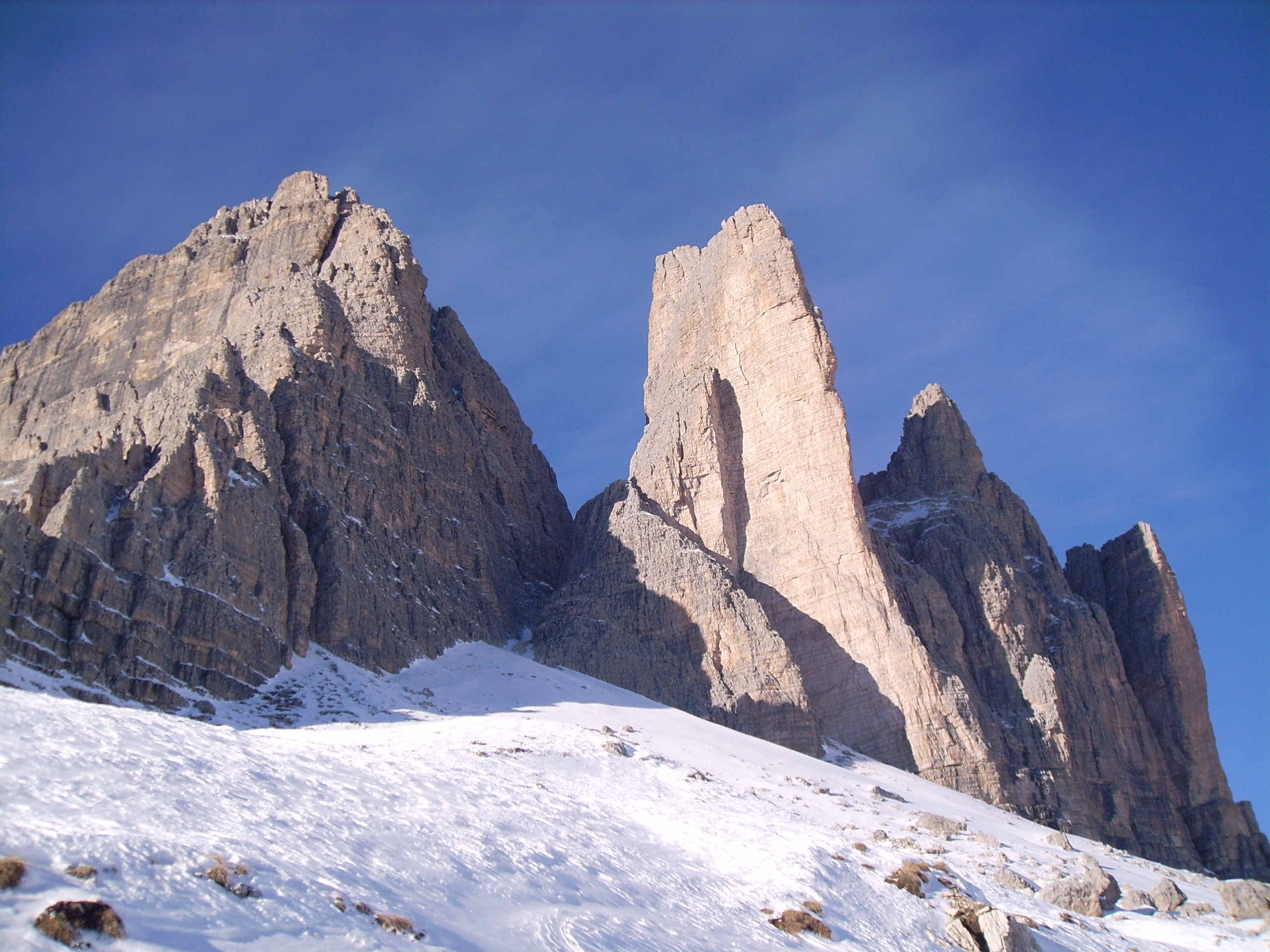 Tre Cime di Lavaredo, Auronzo di Cadore, Belluno, Veneto, Dolomites, Italy